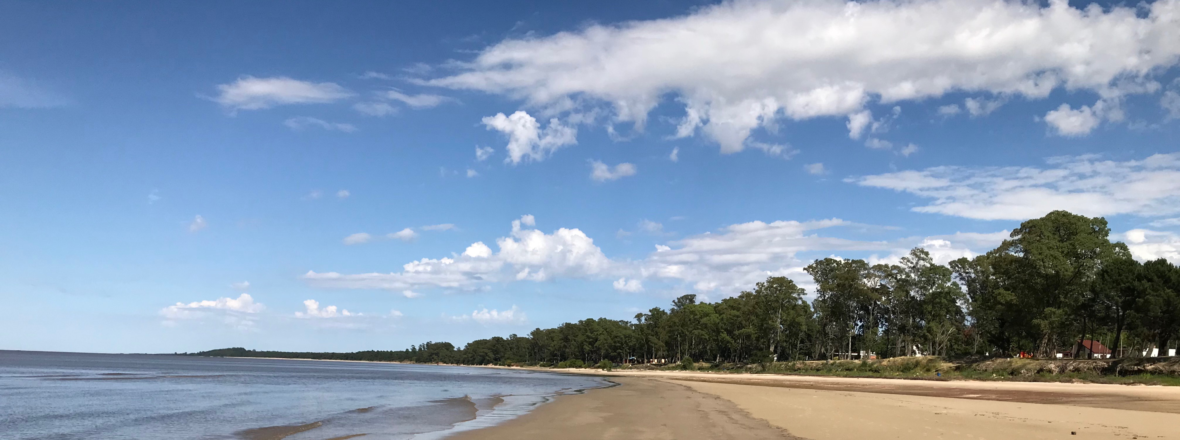 Imagen de la playa de Santa Ana, Colonia, Uruguay, tomada en una mañana de principios de verano.